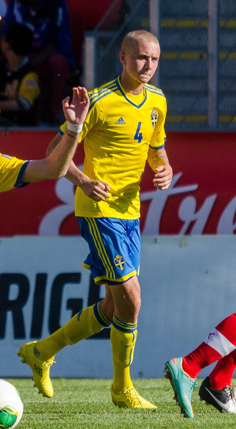 Sebastian Holmén i det svenska U21-landslagets 3-2 seger mot Schweiz i en träninglandskamp på Myresjöhus Arena i Växjö, 6/6 2013.